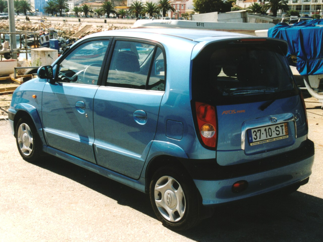 Quelle: Harald H. Linz Fotograf: Harald H. Linz Mit Genehmigung von Harald. H. Linz für Wiki eingestellt.